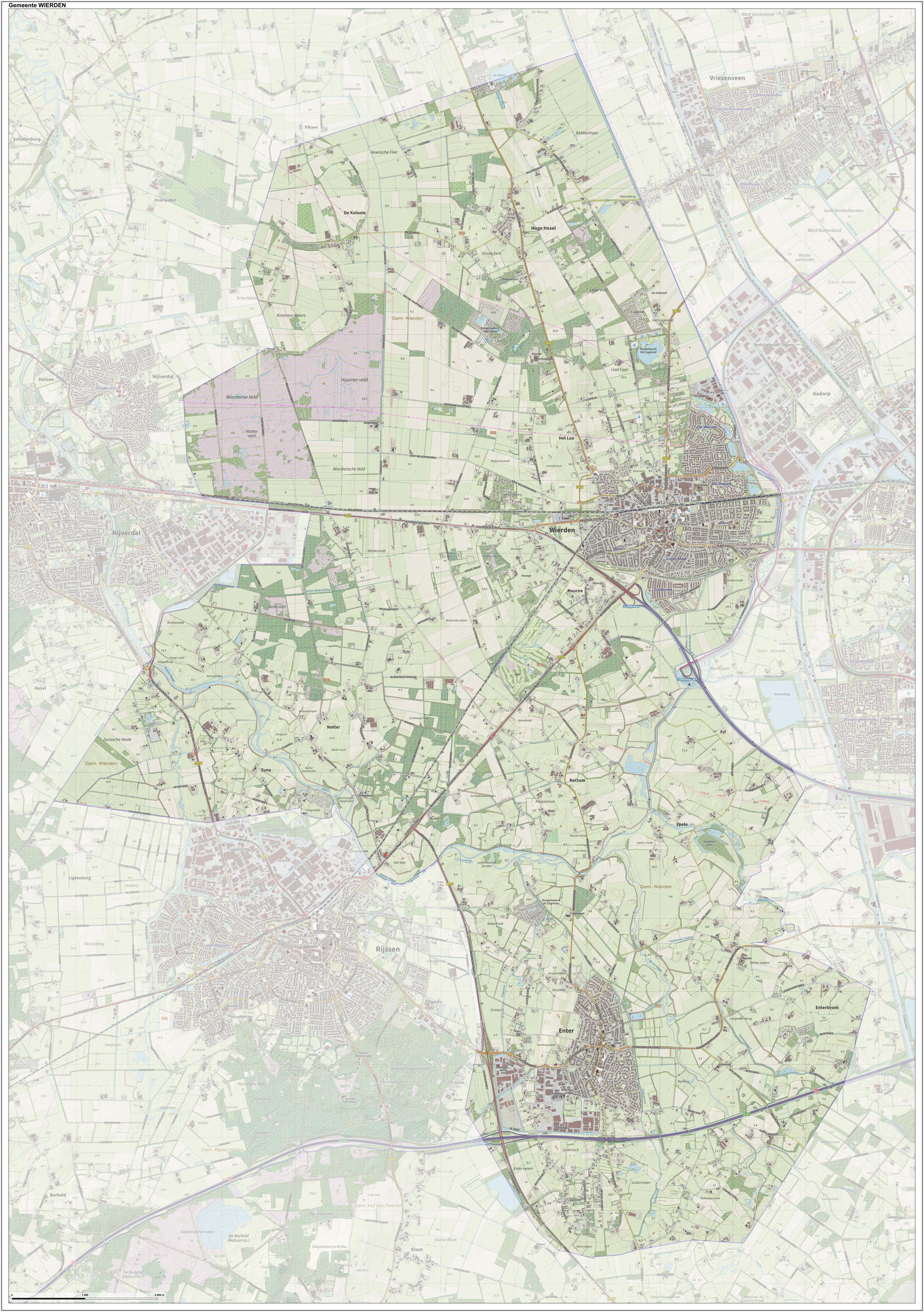 Topografische gemeentekaart. Resolutie: 400 pixels/km. Kaartbeeld samengesteld uit de open geodata van de Top10NL en Top25namen (Kadaster), Creative Commons-BY licentie. Gebouwvlakken uit open geodata BAG extract. Wegen uit de OpenStreetMap, OpenStreetMap community. Reliëfschaduw uit de Actuele Hoogtekaart AHN2. Samenstelling en kleurenschema: Jan-Willem van Aalst, met QGIS. Zie ook de Legenda.